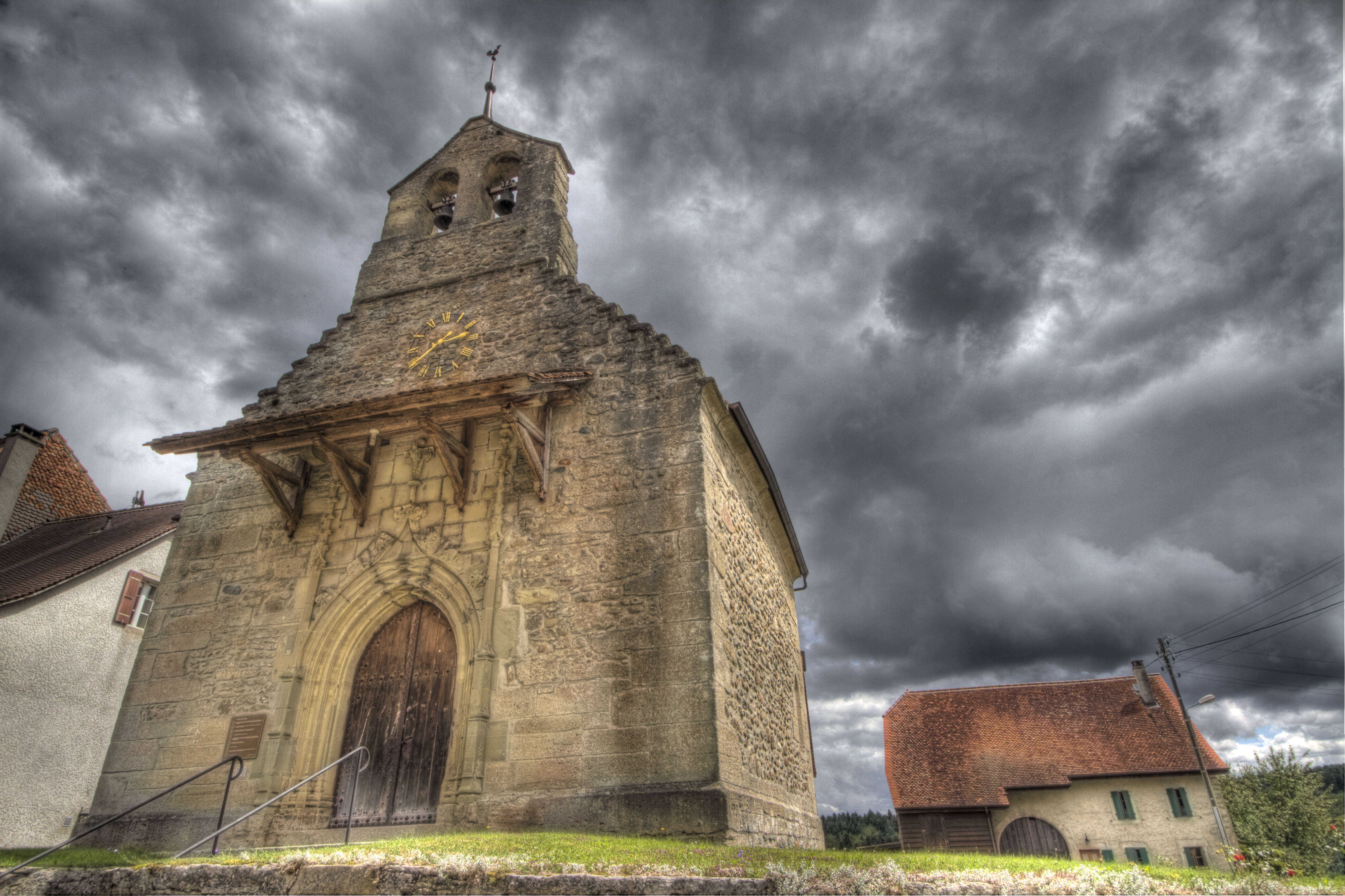 Eglise paroissiale de Treytorrens (Vaud)